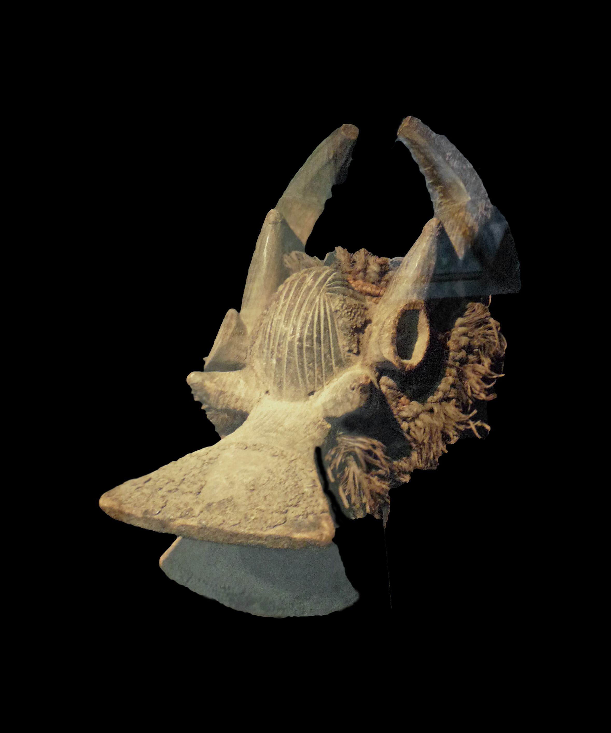 Masque cimier horizontal, Yukuben (?). Première moitié du 20e s. Bois dur, patine grisâtre-marron, graine d'abrus, fibres. Musée Barbier-Mueller. Exposition Nigeria. Arts de la vallée de la Bénoué au musée du quai Branly (Paris).